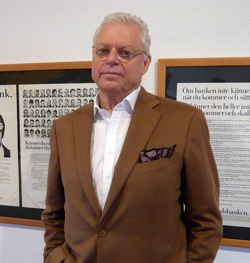 Ove Pihl